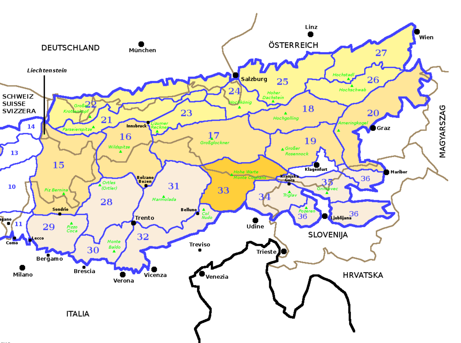 Alpi Orientali secondo la SOIUSA con evidenziate le Alpi Carniche e della Gail